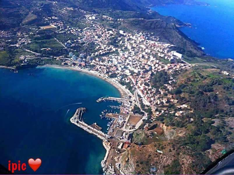 vue aérienne